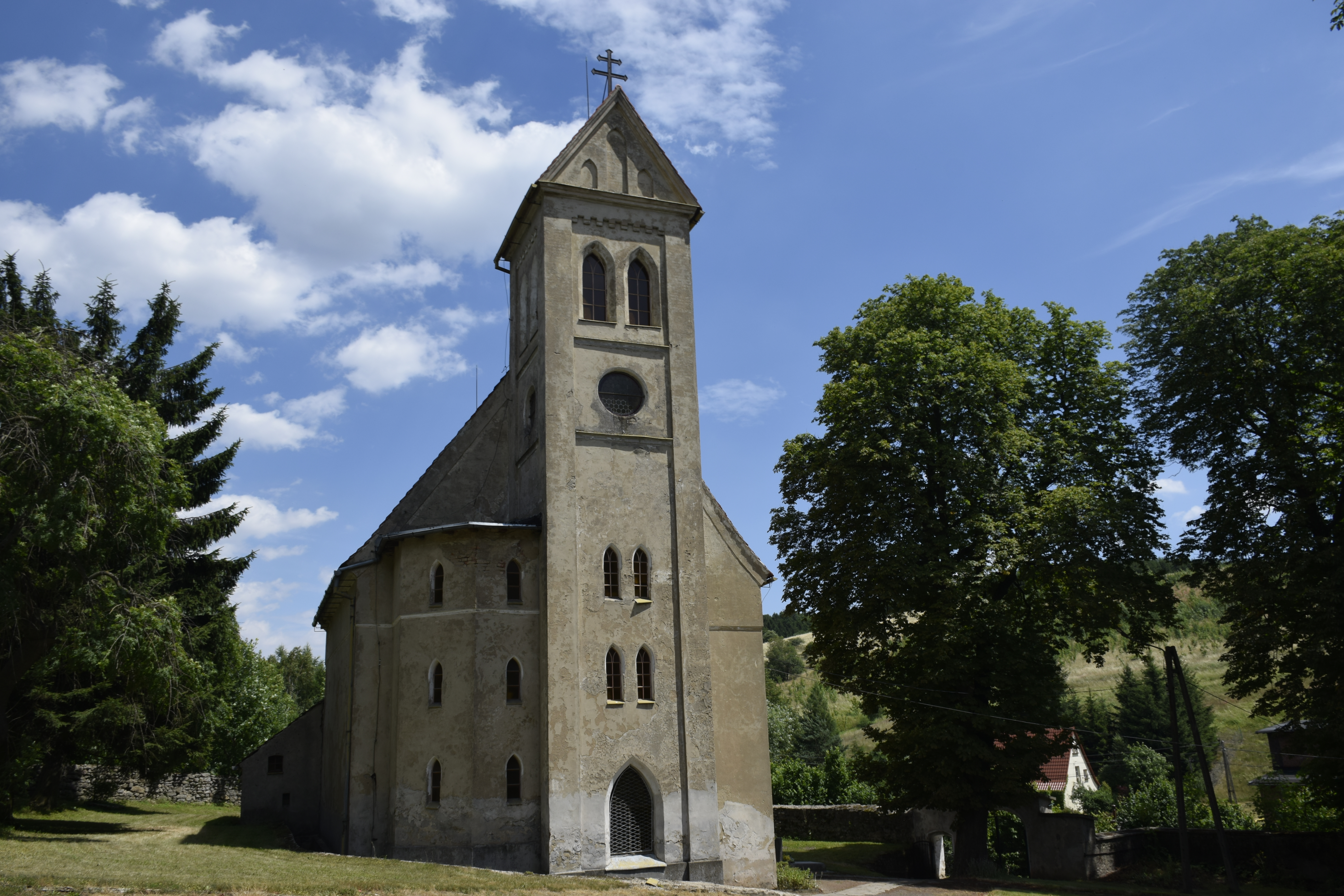 Jabłów. Polska.